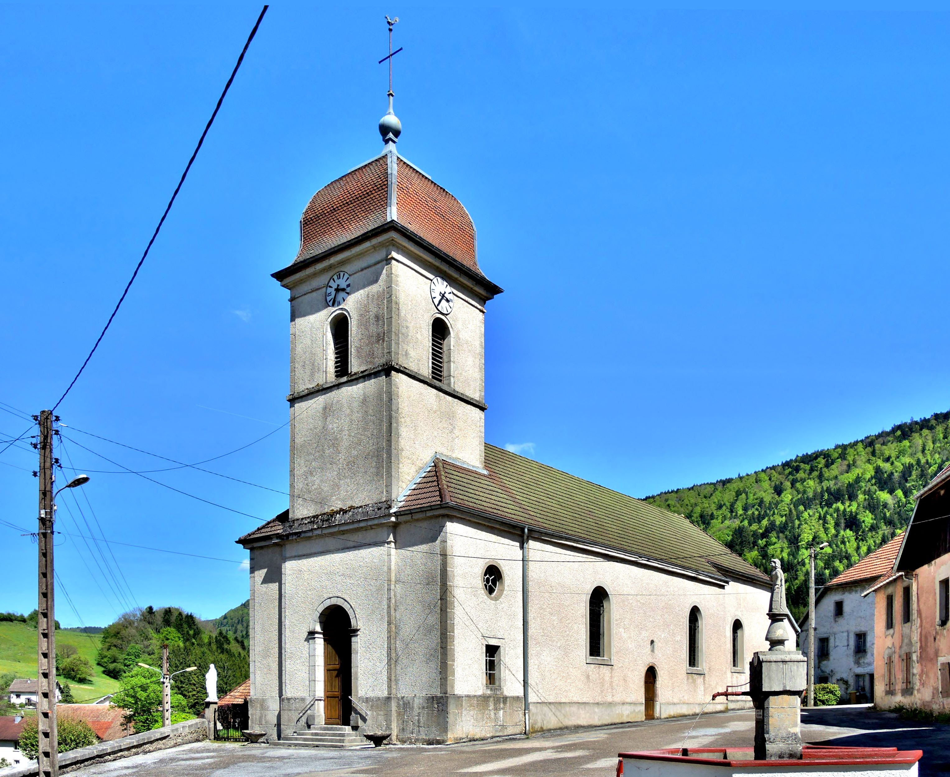 Eglise Sainte Foy, à Rosureux. Doubs